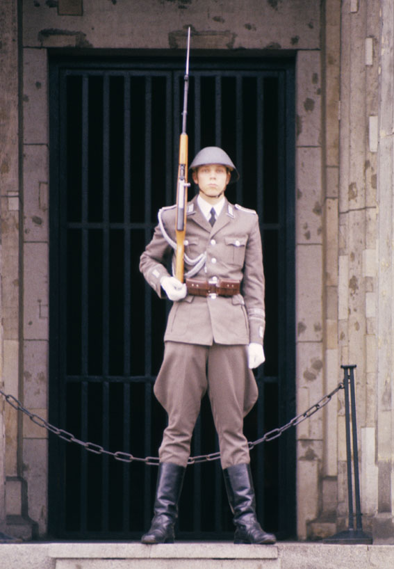 Ehrenwache des "Wachregiments Friedrich Engels" der NVA, Neue Wache, Berlin (DDR)